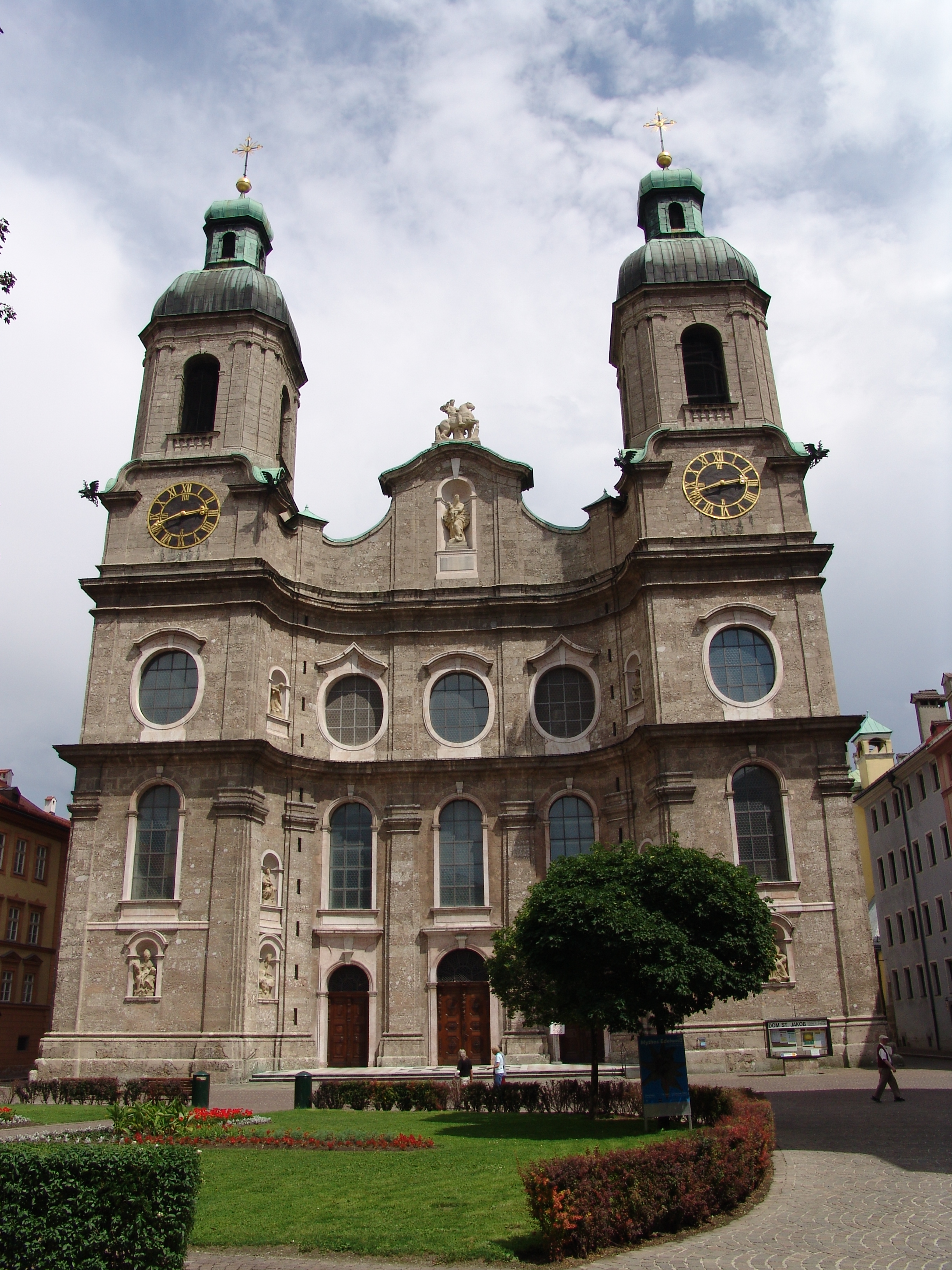 Dom zu St. Jakob in Innsbruck, Österreich